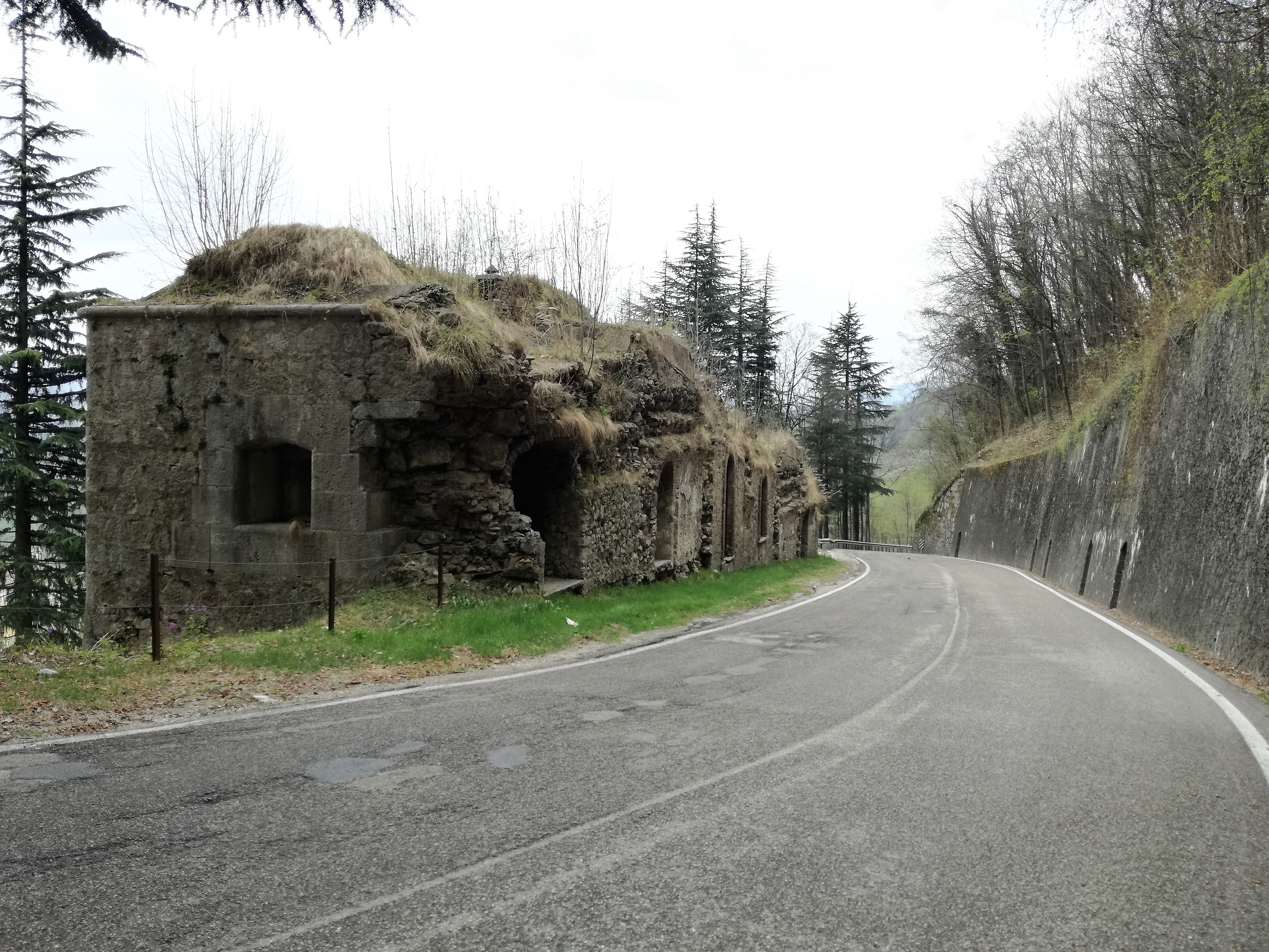 Tagliata Bariola - Frontseite